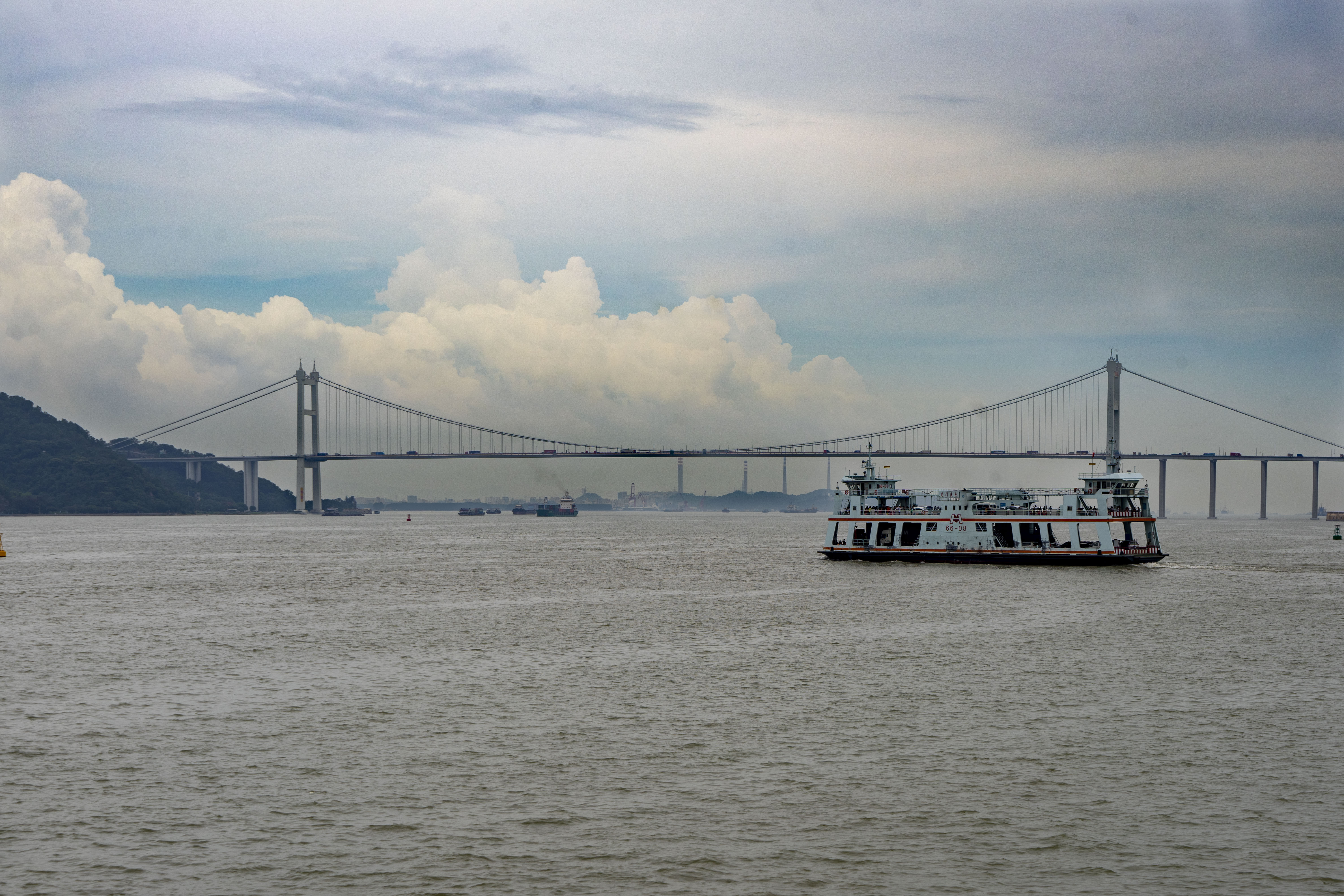 虎门大桥和虎门汽车轮渡 拍摄于渡船上 摄于虎门渡口运行的最后一天